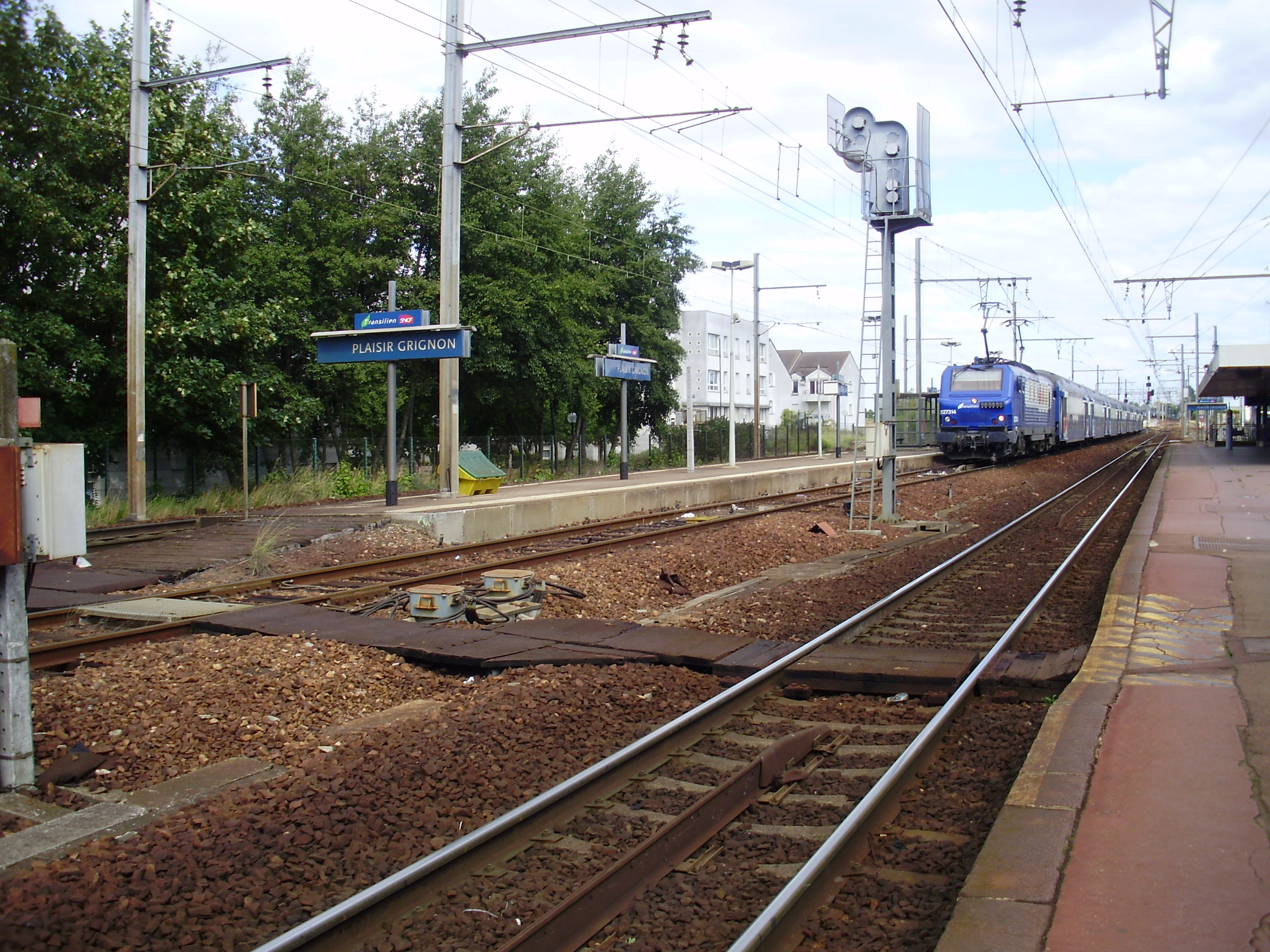 Gare de Plaisir - Grignon, à Plaisir, Yvelines, France : quais et voies depuis le quai pour Dreux ou Mantes-la-Jolie en regardant vers Paris-Montparnasse